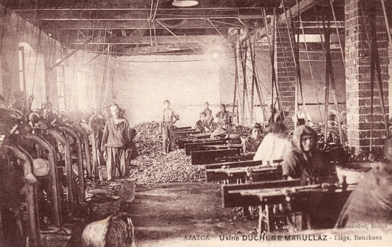 Usine de liège et bouchons Duchêne-Marullaz, Azazga (Algérie)